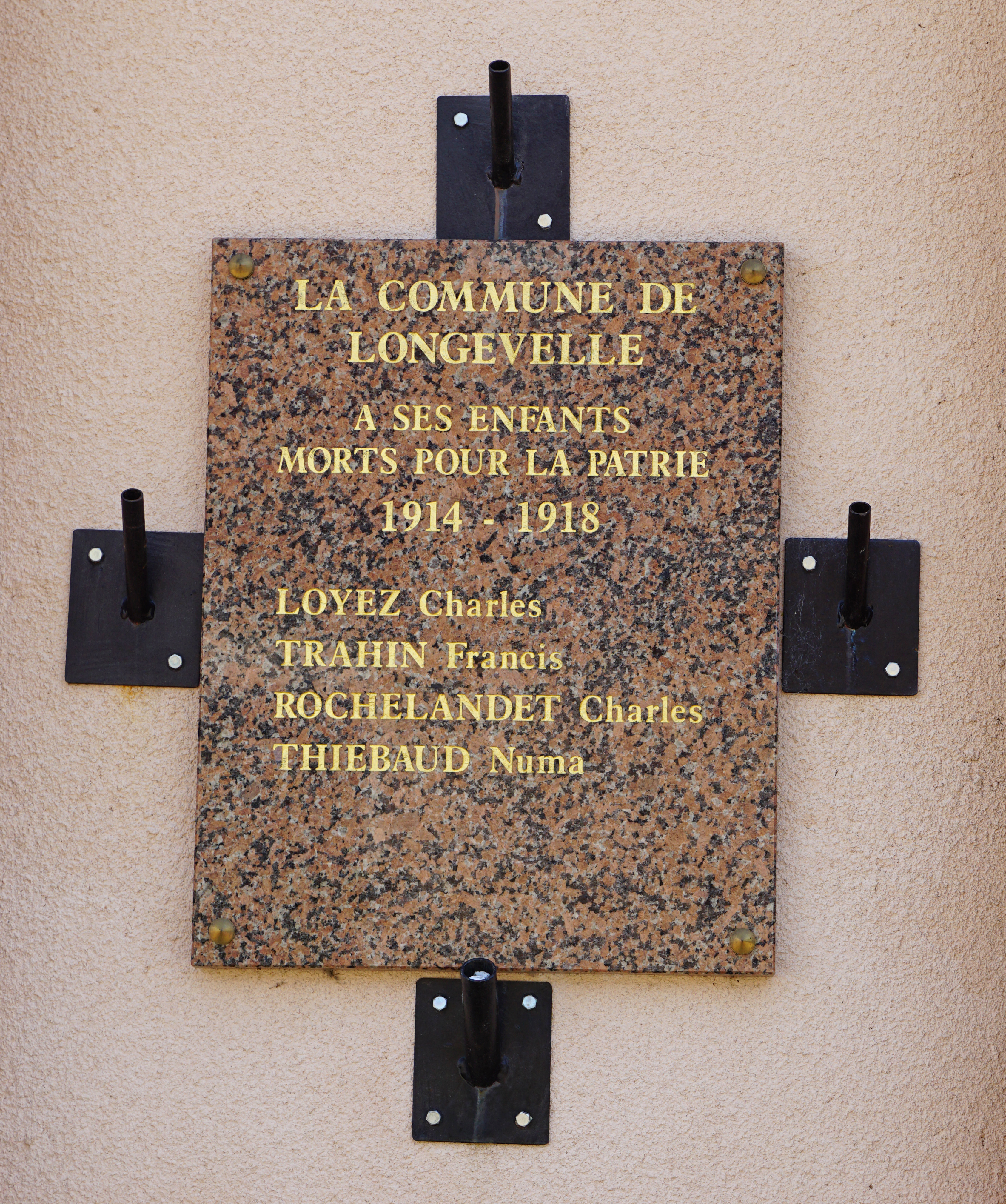 Plaque commémorative à Longevelle.